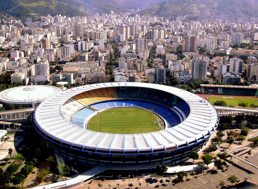 Foto da minha viagem de helicóptero pelo Rio — Estádio do Maracanã + Maracanã (bairro).